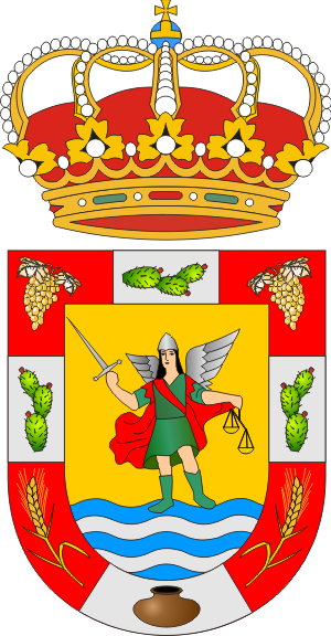 Escudo de San Miguel de Abona (Tenerife)